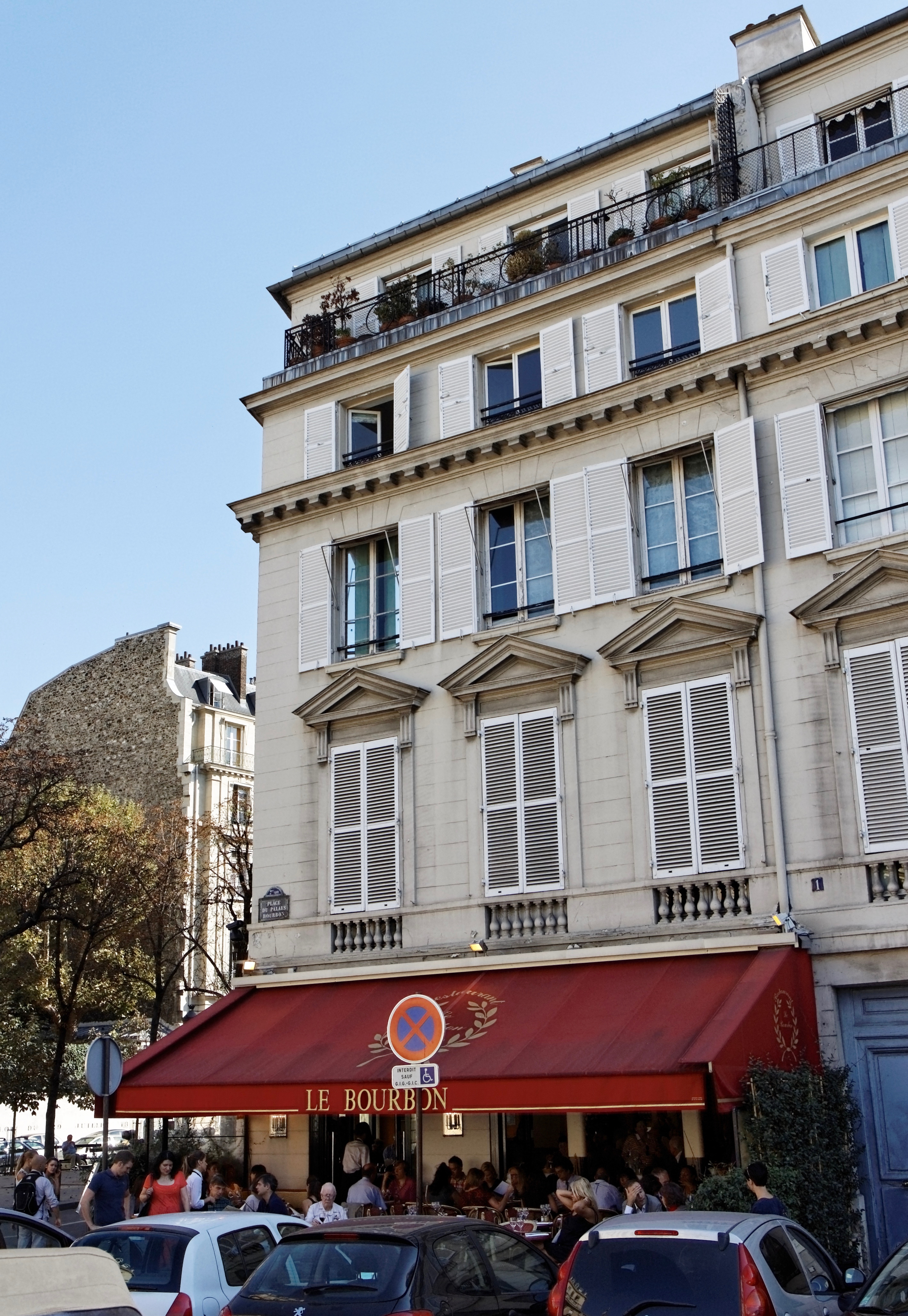 Un immeuble.